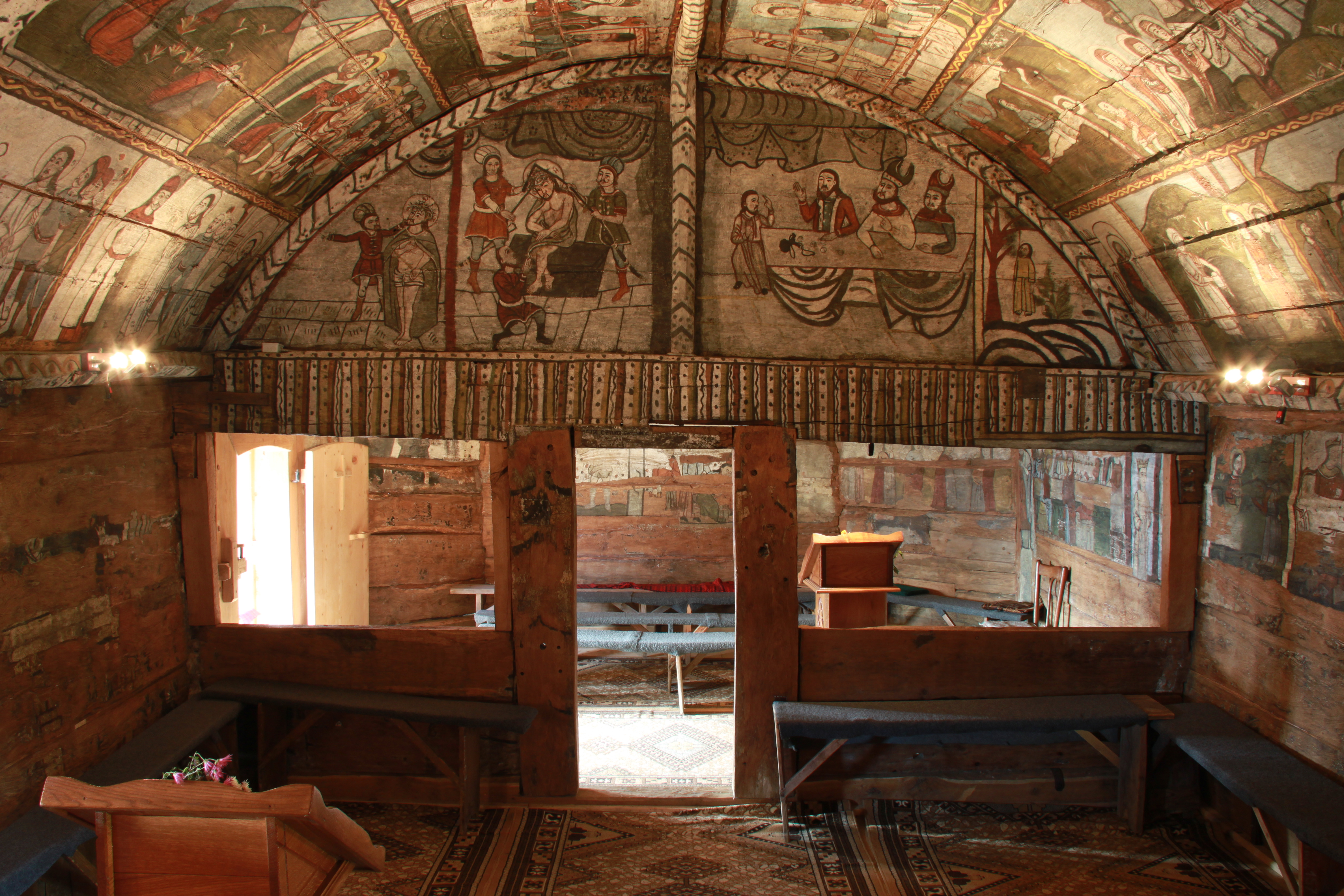 October 2010